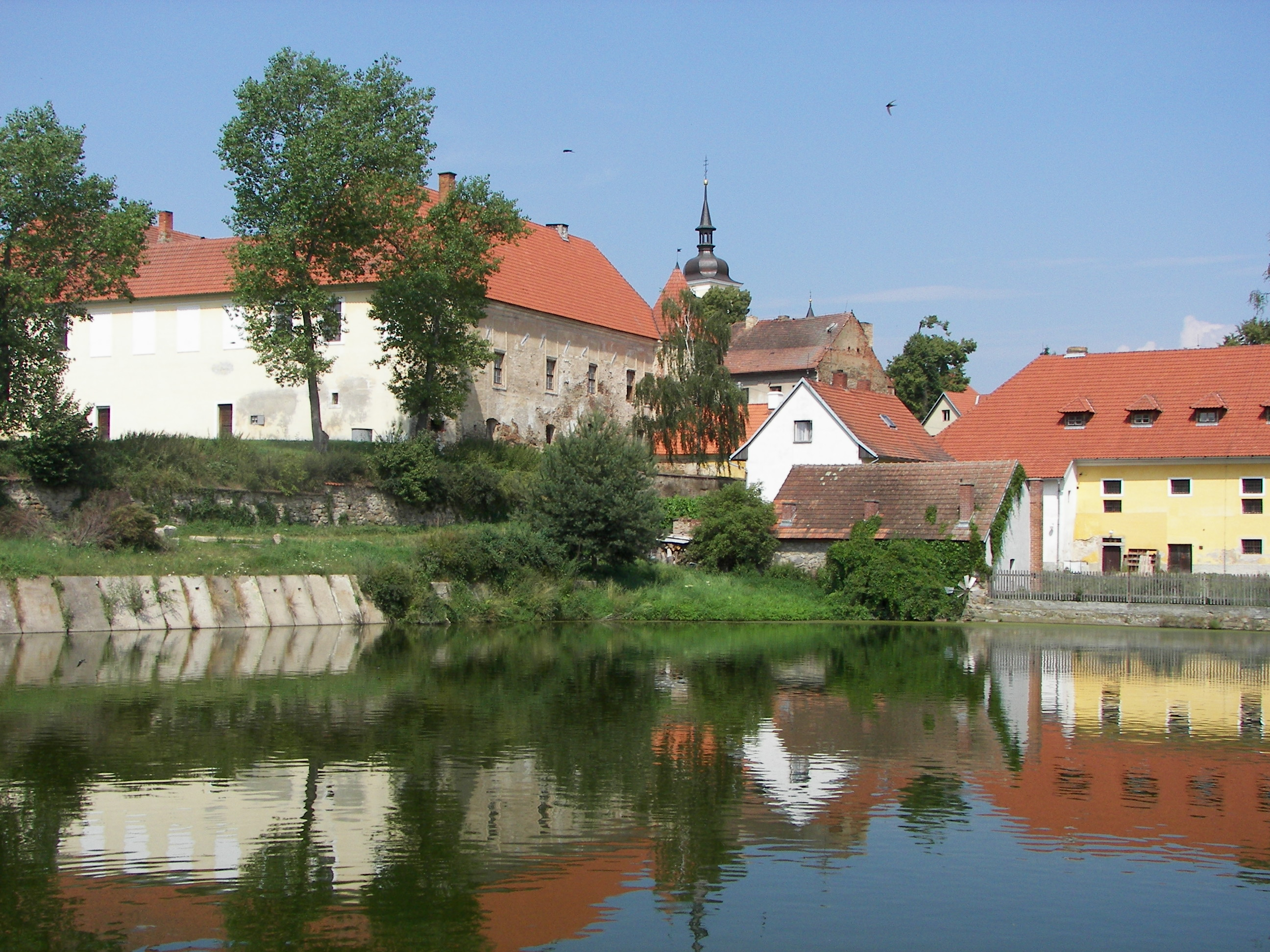 Kostel Nanebevzetí Pnny Marie v Louňovicích pod Blaníkem (pohled od rybníka)